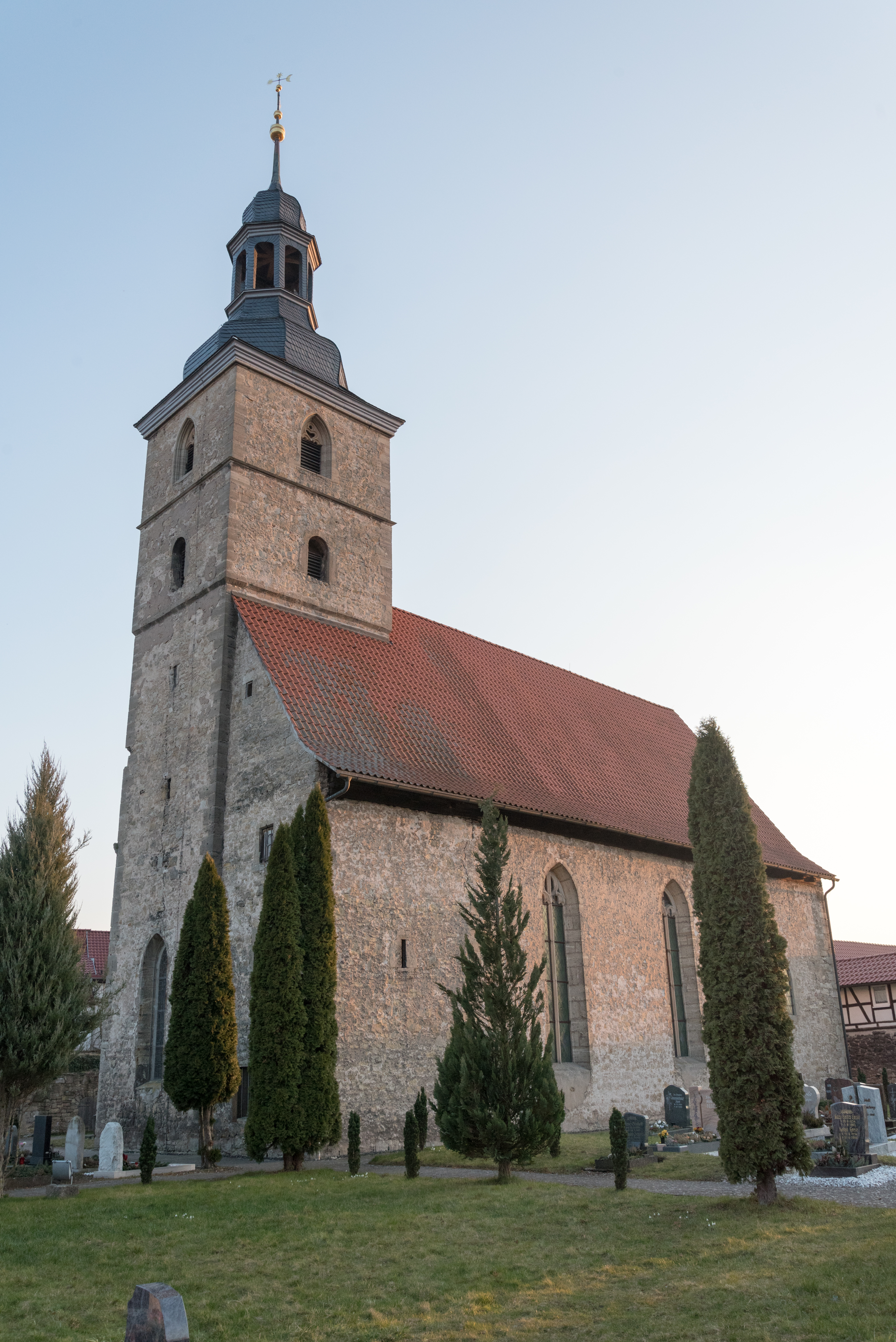 Obermaßfeld, Wehrkirchenanlage